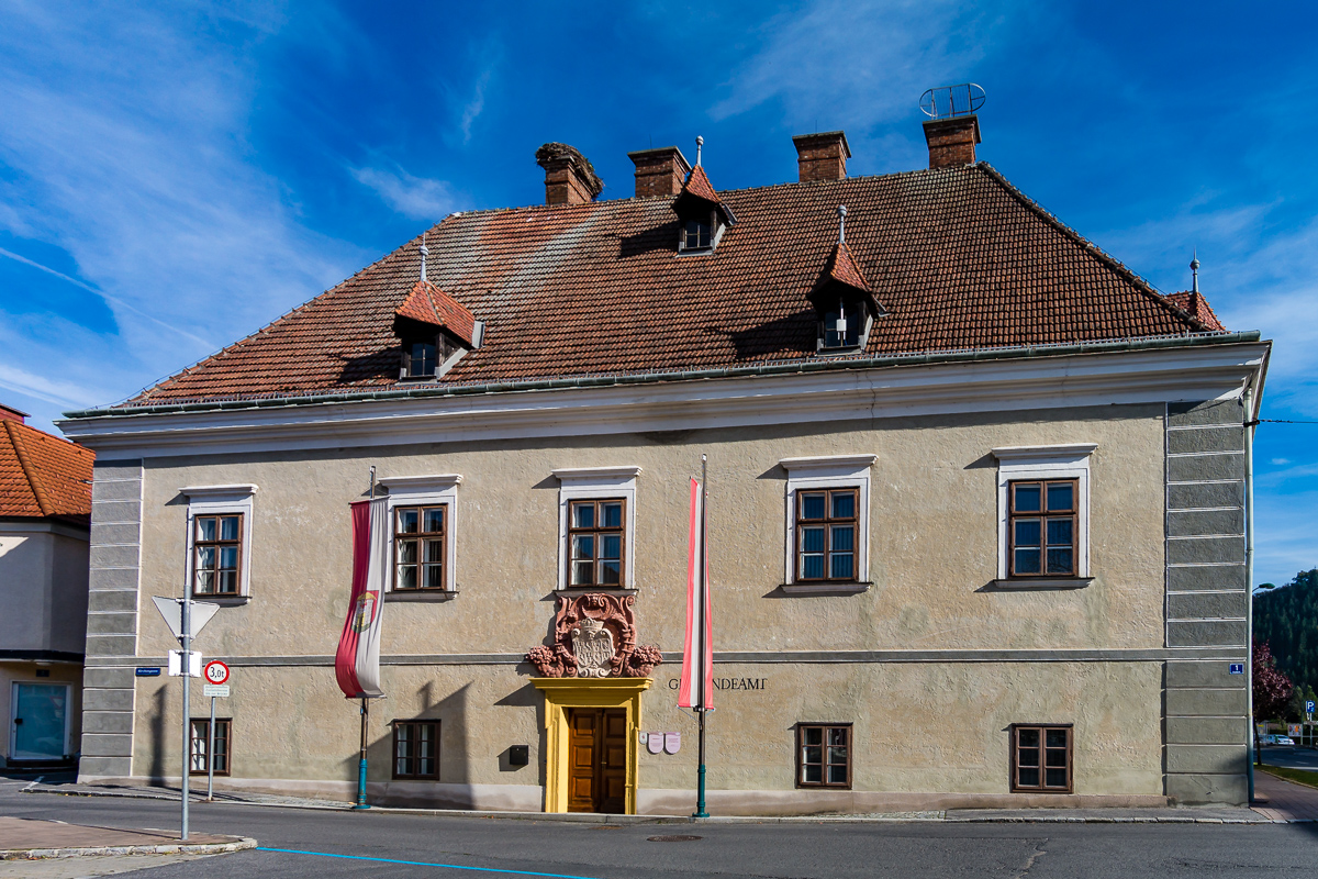 Hofhaus (Rathaus) Kirchschlag in der Buckligen Welt